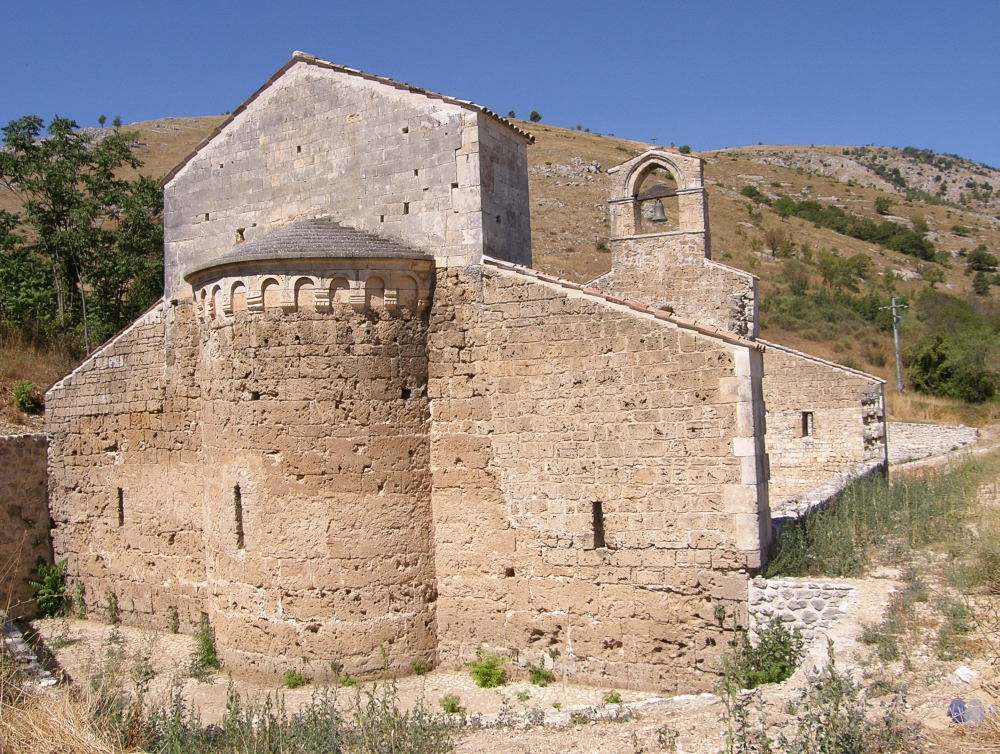 S. Maria di Cartiganano Bussi sul Tirino